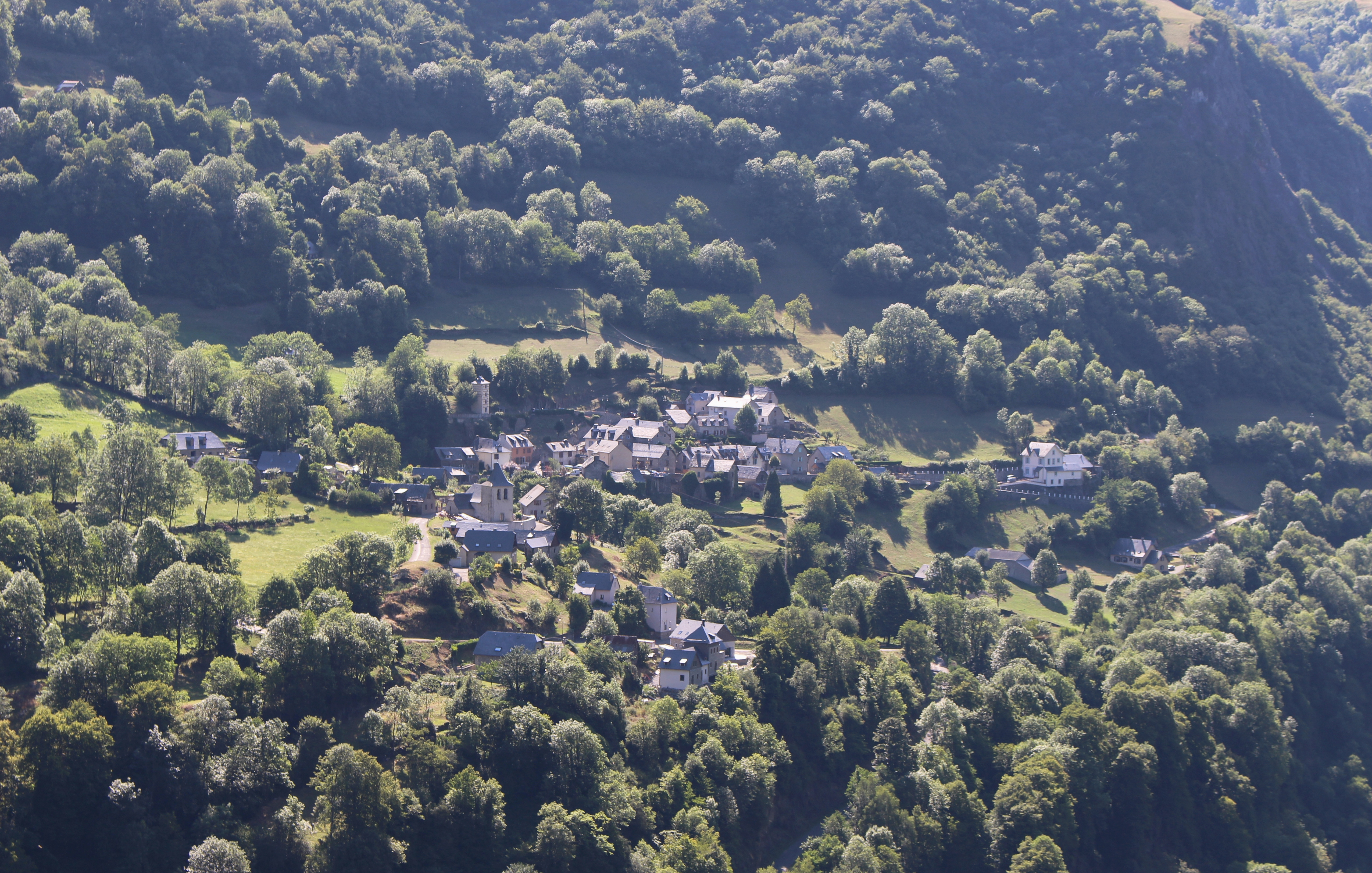 Chèze (Hautes-Pyrénées)